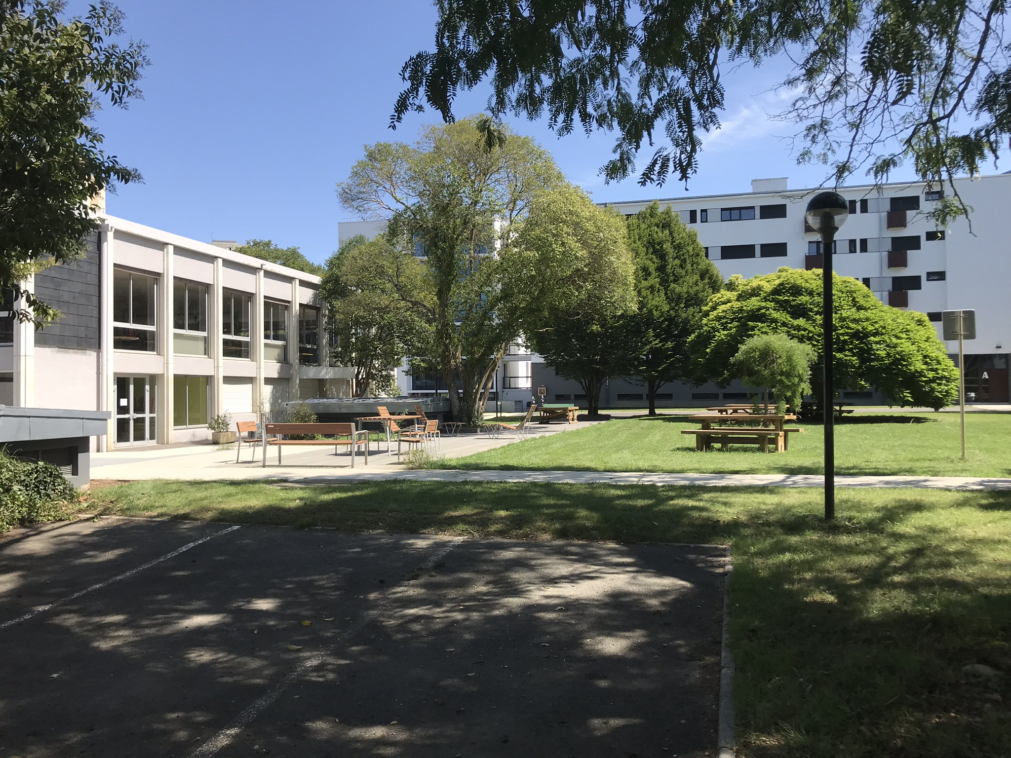 Le restaurant universitaire de Tarbes avec vue sur le parc de la cité universitaire.